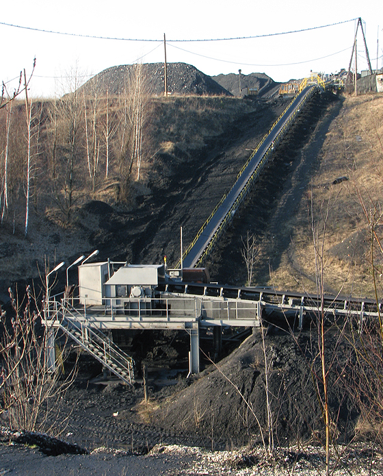 hałda Pochwacie, Slag heap, Jastrzębie Zdrój